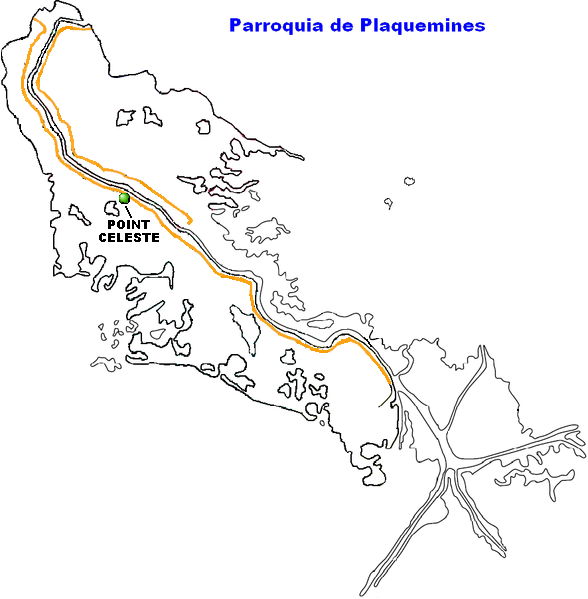 Point Celeste, Louisiana.